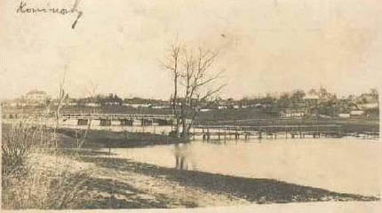 Село Конюхи (Козівський район) Тернопільської області